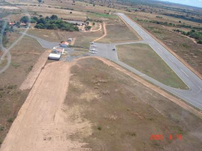 Vista Aérea do aeroporto